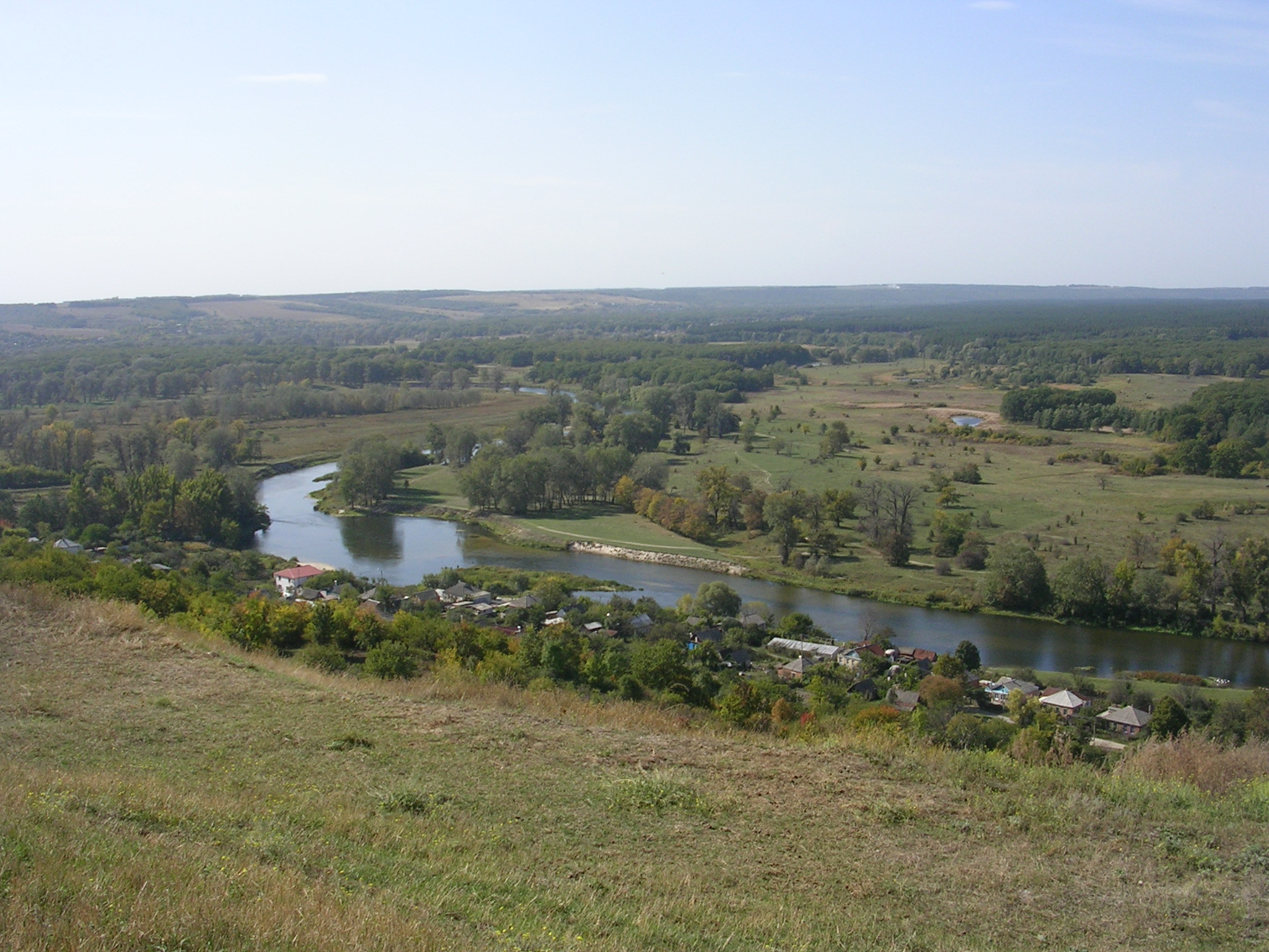 Поселення Ізюм, Ізюм, на правому березі річки Сіверський Донець, в межах або в безпосередній близькості до сучасного міста. Більша за площею фортифікація розташована північніше, в районі історичного центру сучасного міста, а менша - на вершині гори Крем'янець, впритул до південної межі сучасного міста